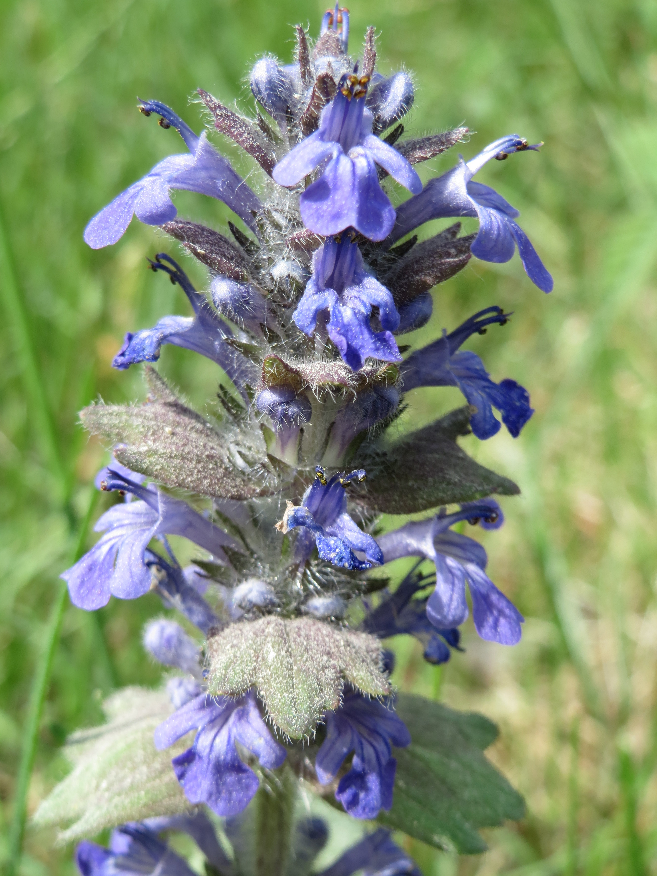 Genfer Günsel (Ajuga genevensis) auf dem Feldherrenhügel (Naturschutzgebiet Oftersheimer Dünen)